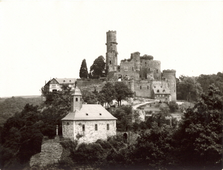 Burg Reichenberg im Rhein-Lahn-Kreis vor 1962